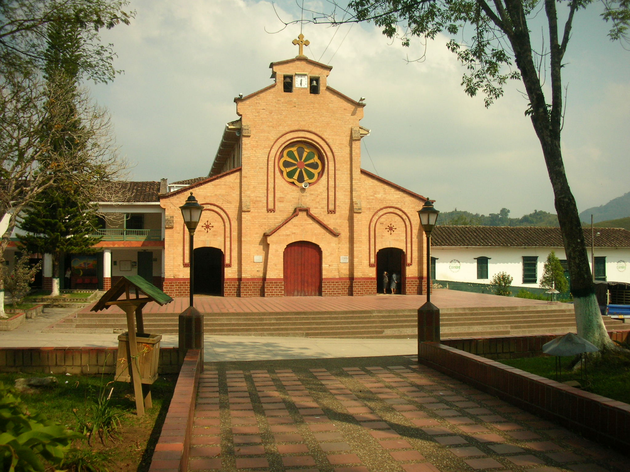 Alejandría.